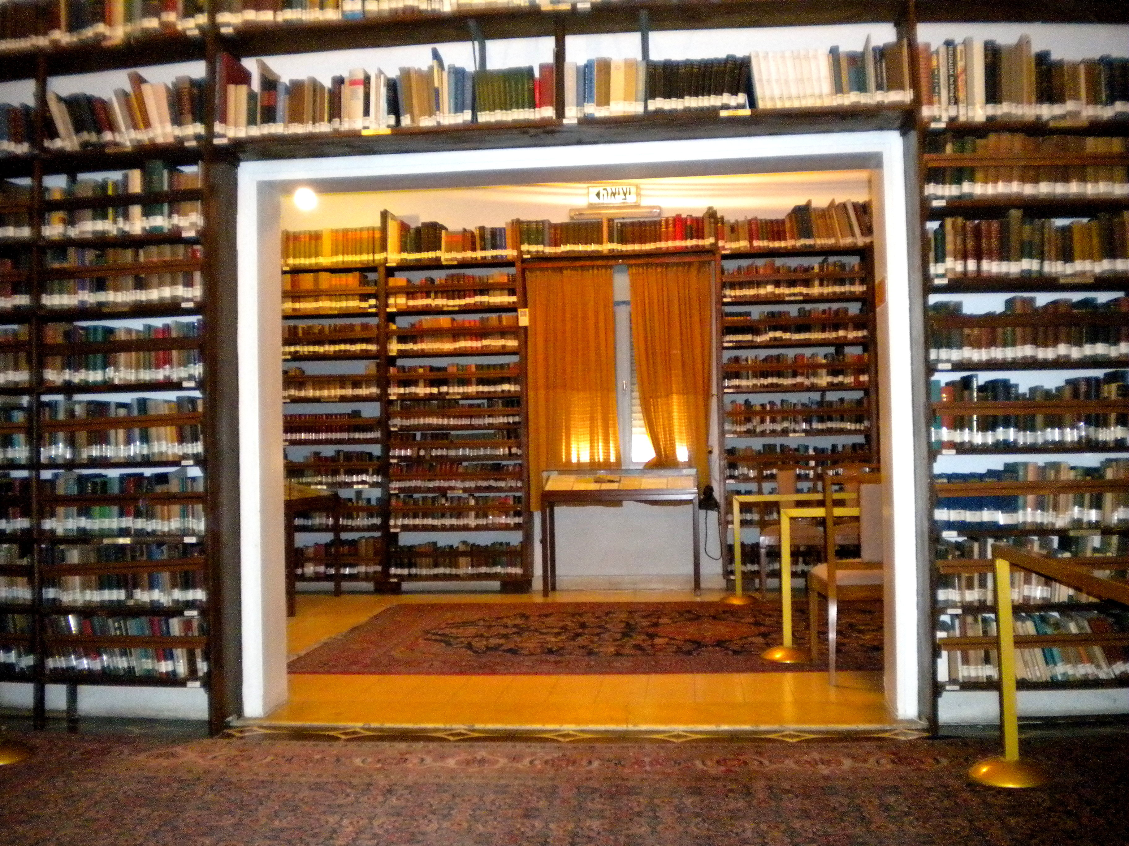 בית בן-גוריון שימש למגוריהם של ראש הממשלה ושר הביטחון הראשון של ישראל, דוד בן-גוריון, ומשפחתו, בין השנים 1931 ל-1968, בנוסף לצריף בשדה בוקר ולבית ראש הממשלה בירושלים. הבית שוכן בשדרות בן-גוריון 17 בתל אביב. הבית מתופעל על ידי המכון למורשת בן-גוריון.